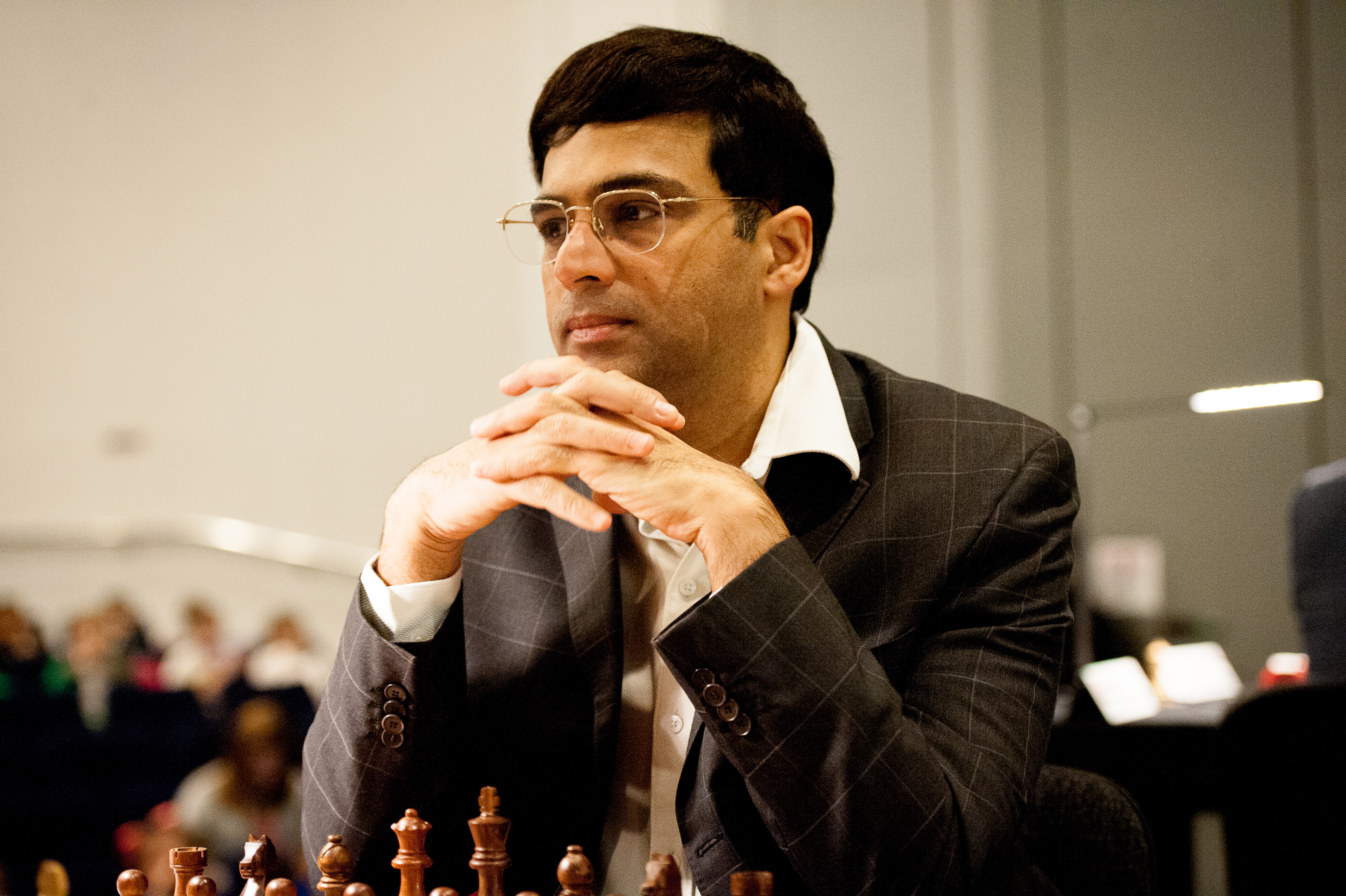 Viswanathan Anand 2016